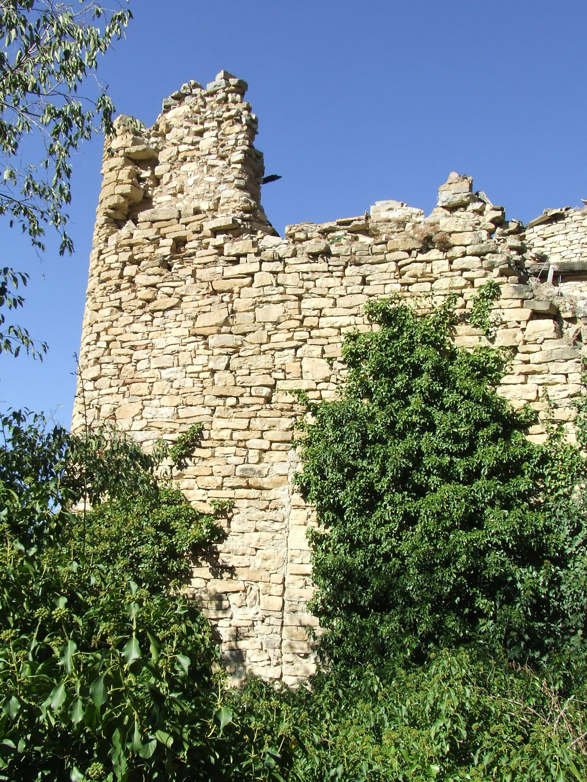 Possibles restes del castell de Montesquiu (Orcau, Isona i Conca Dellà, Pallars Jussà)